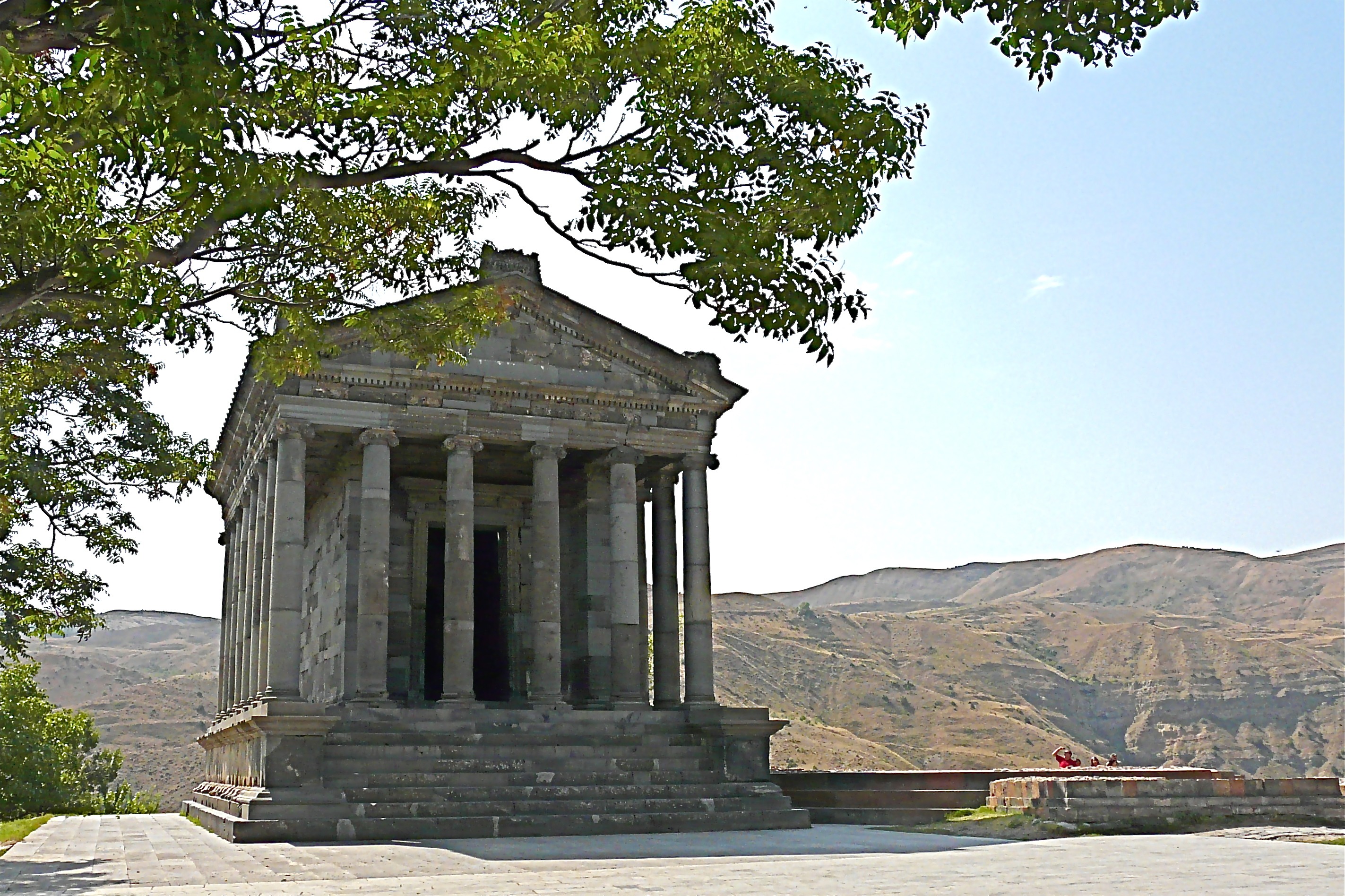 Op een platform van de basaltschlucht van de Aziatrivier bevindt zich de tempel van Garni. Dit is een zonnetempel in Griek-Romeinse stijl gebouwd in de 1st eeuw na Ch. In de derde eeuw bouwen de Armeense koningen er hun zomerresidentie. De Hellenistische tempel werd na een aardbeving origineel heropgebouwd. Lees meer over de boeiende geschiedenis